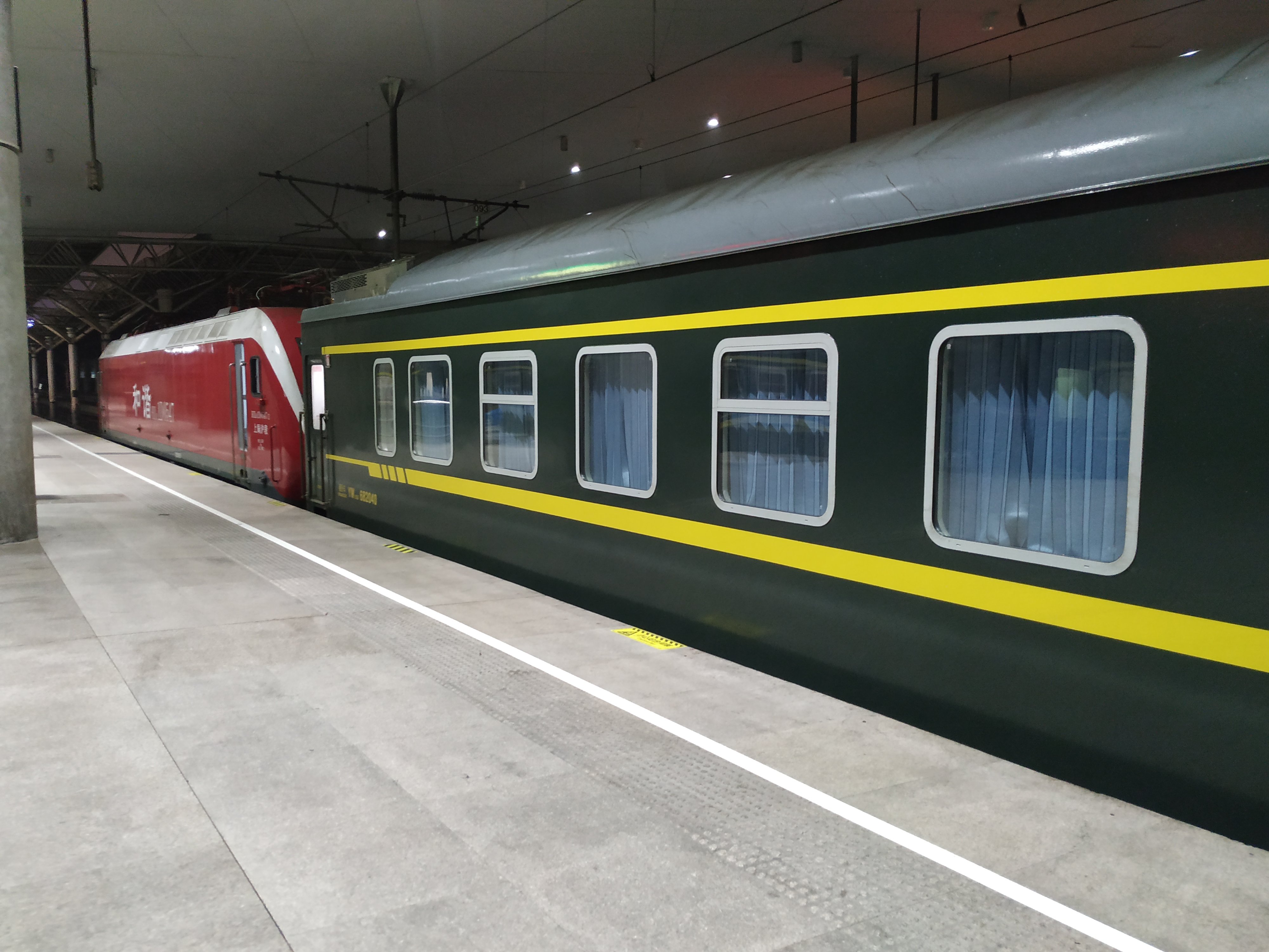 中文（中国大陆）: k525在上海南站